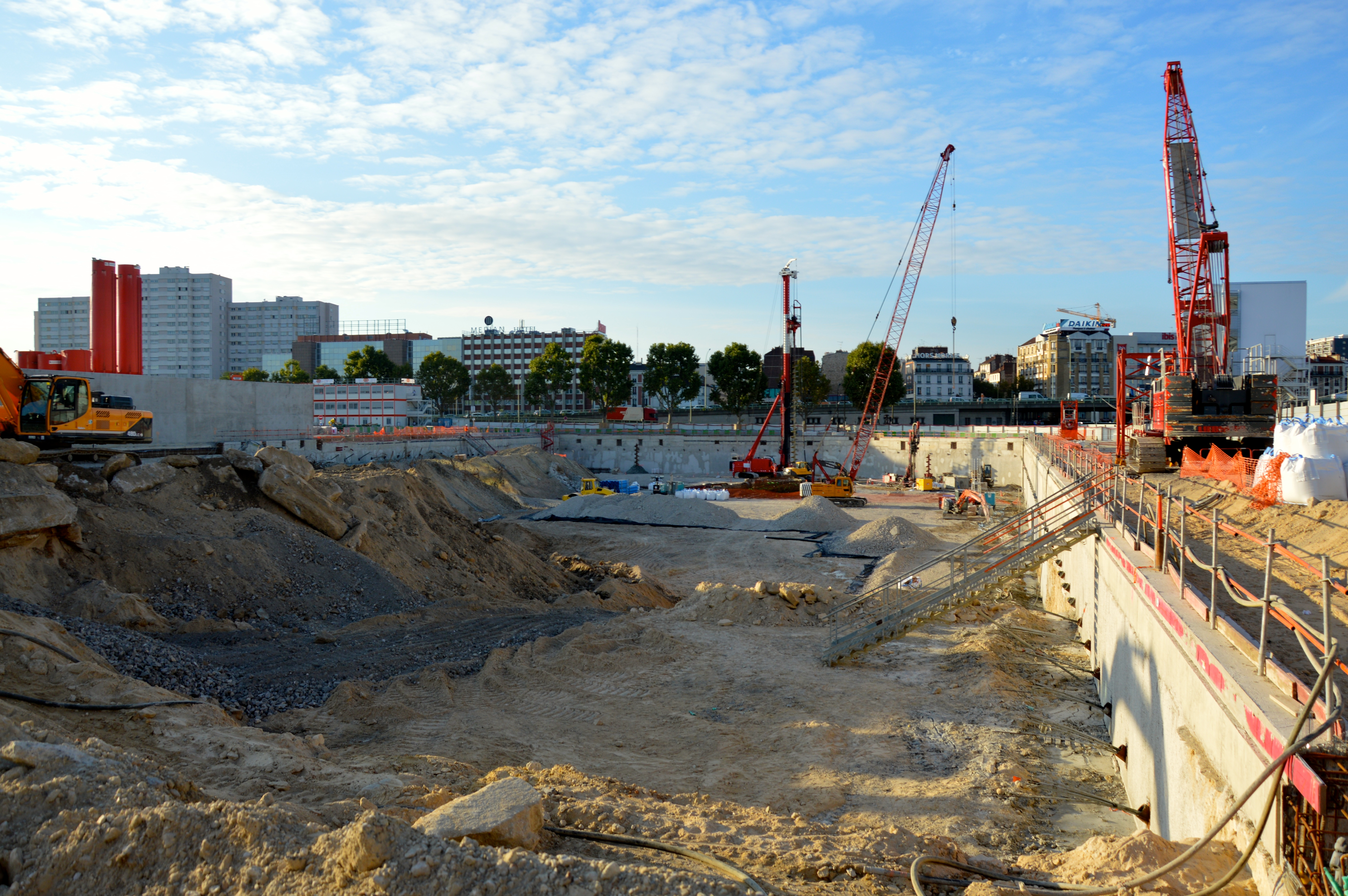 Les fondation du palais de justice le 1er Octobre 2014